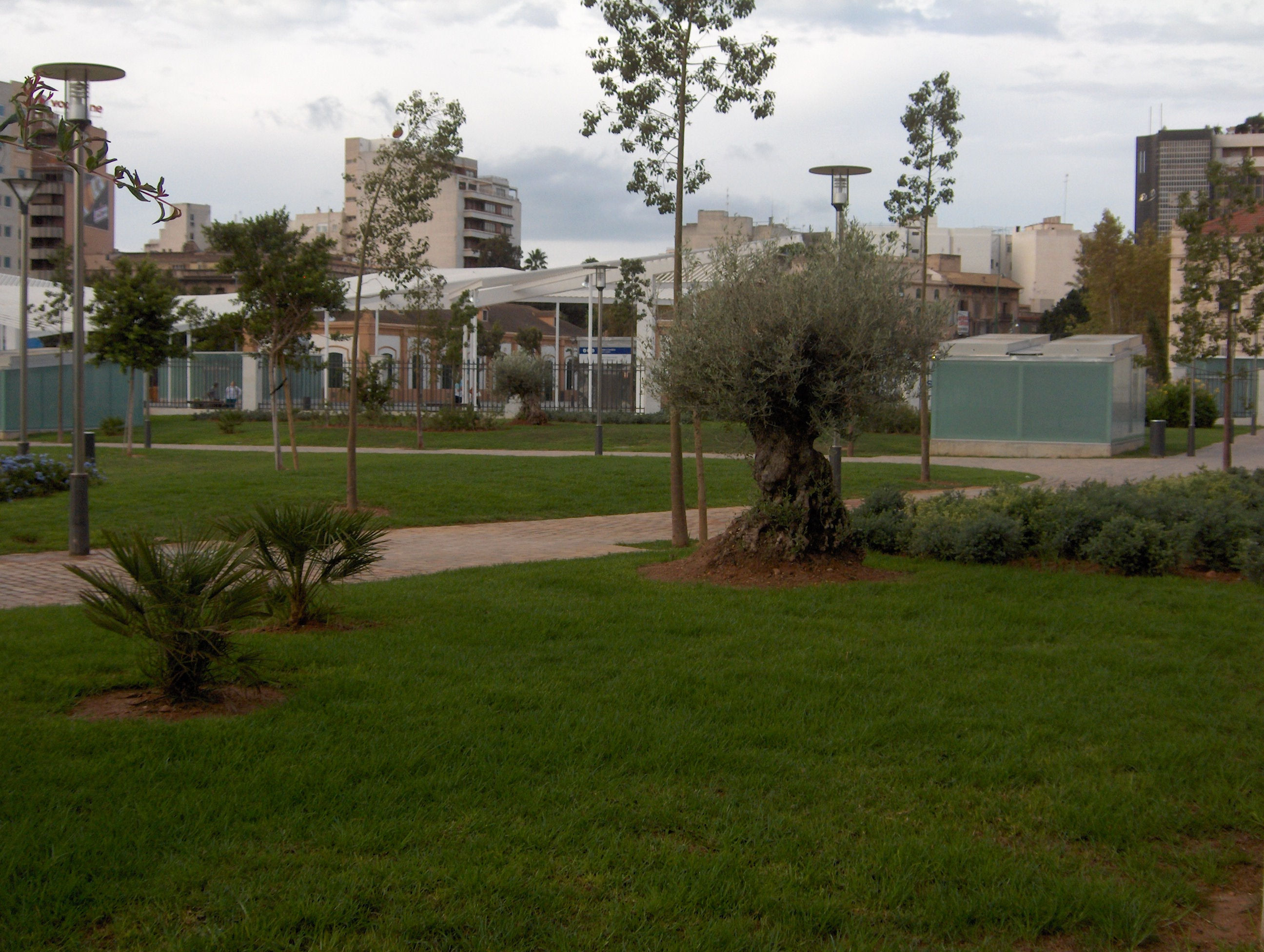 View into the Parque de ses Estaciónes in Palma de Mallorca